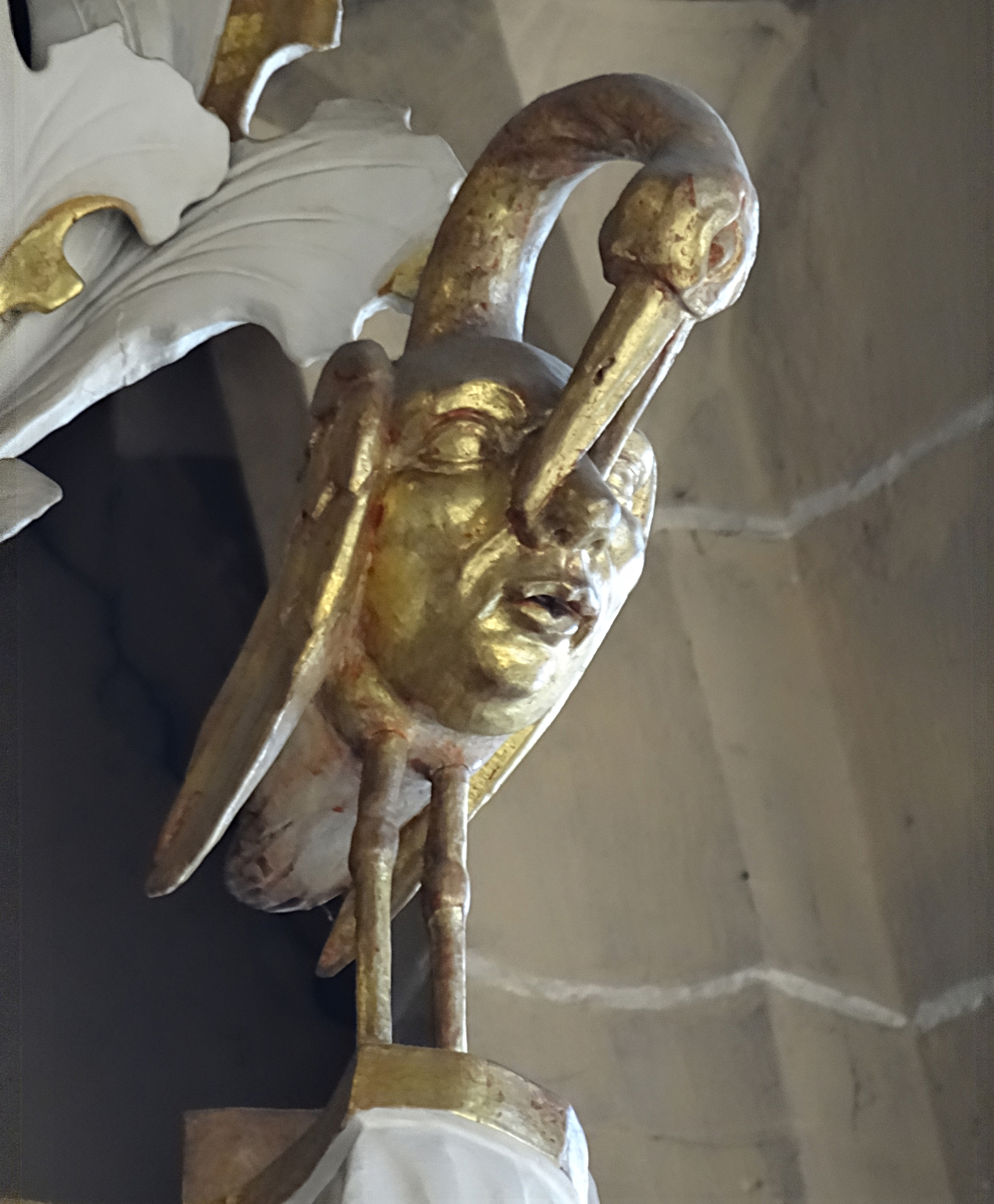 Detail am Barockgehäuse der Wender-Orgel von 1714 in der Severikirche Erfurt. Der "Vogel Selbsterkenntnis" meint: "Gehe in dich und erkenne dich selbst!" und verweist so auf die Aufklärung: "Habe Mut, dich deines eigenen Verstandes zu bedienen!".[1]